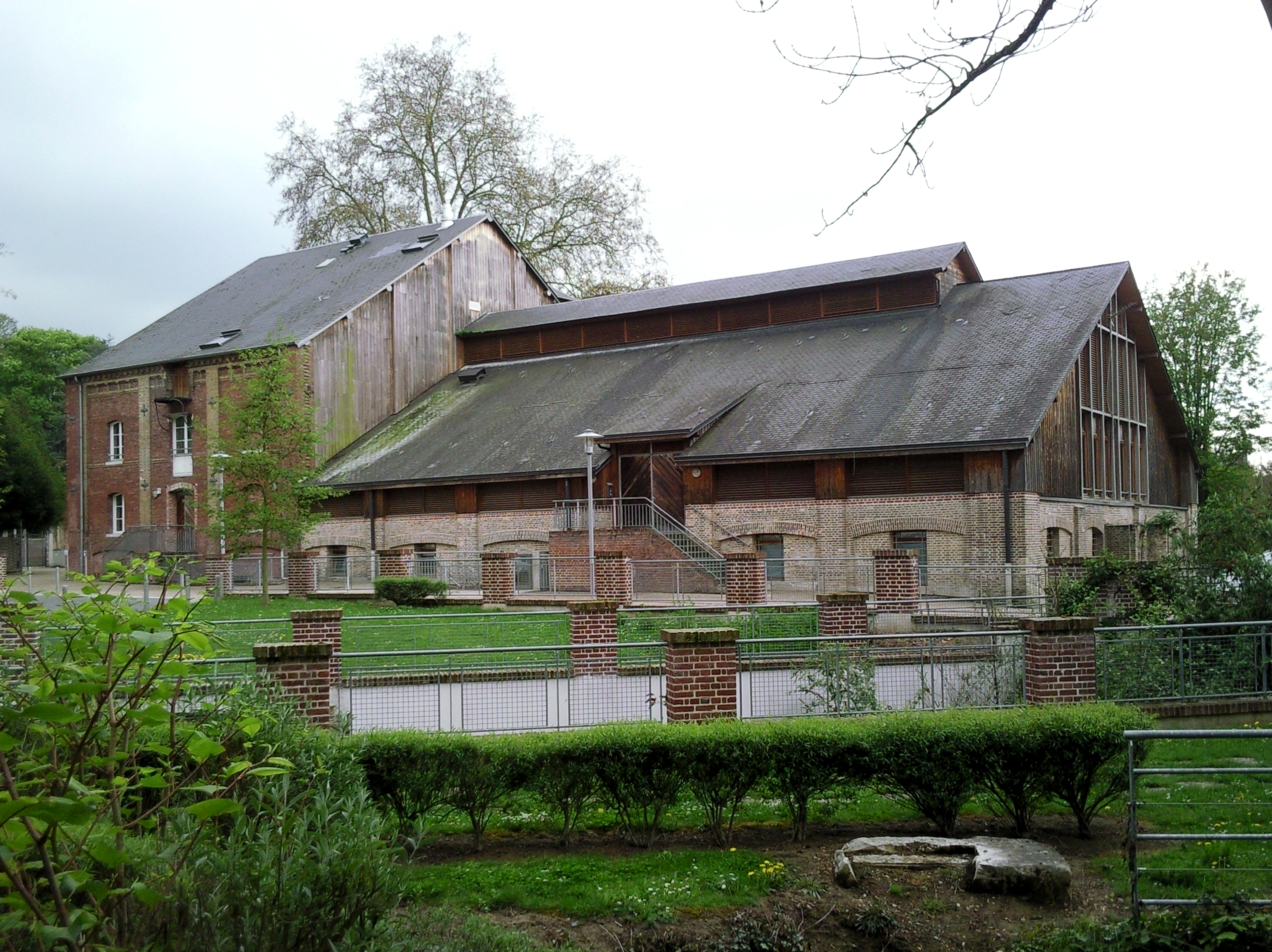 Centre culturel du Moulin à Louviers (Eure) depuis 1978. Successivement moulin à tan au XVIIIe siècle, moulin à foulon (coton) en l'an XIII, filature de drap Jourdain-Ribouleau en 1824, grand moulin à blé (minoterie) de la famille Lair en 1890, usine vétérinaire en 1962.